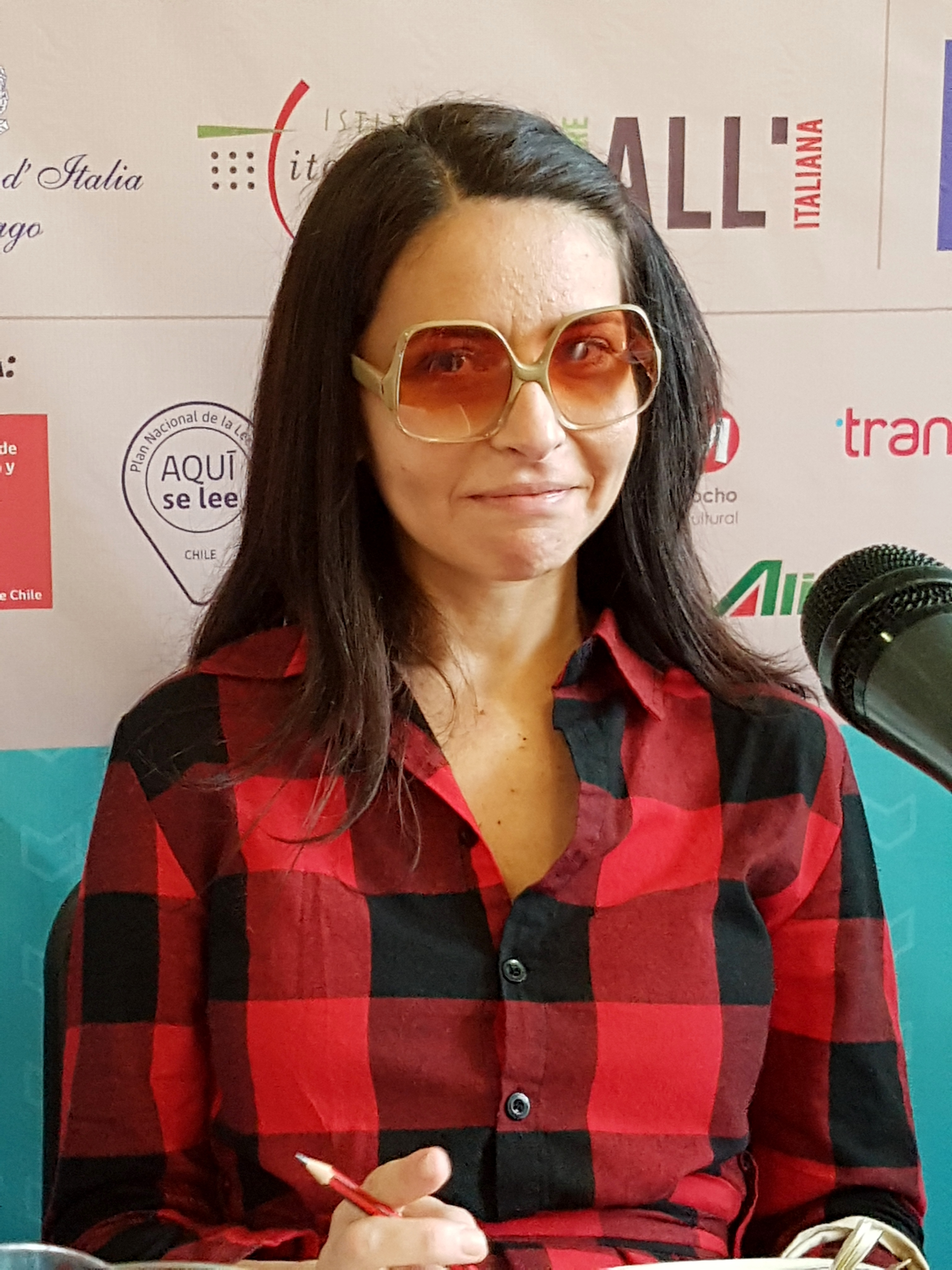 La escritora argentina Lola Copacabana en la Feria Internacional del Libro de Santiago 2017.